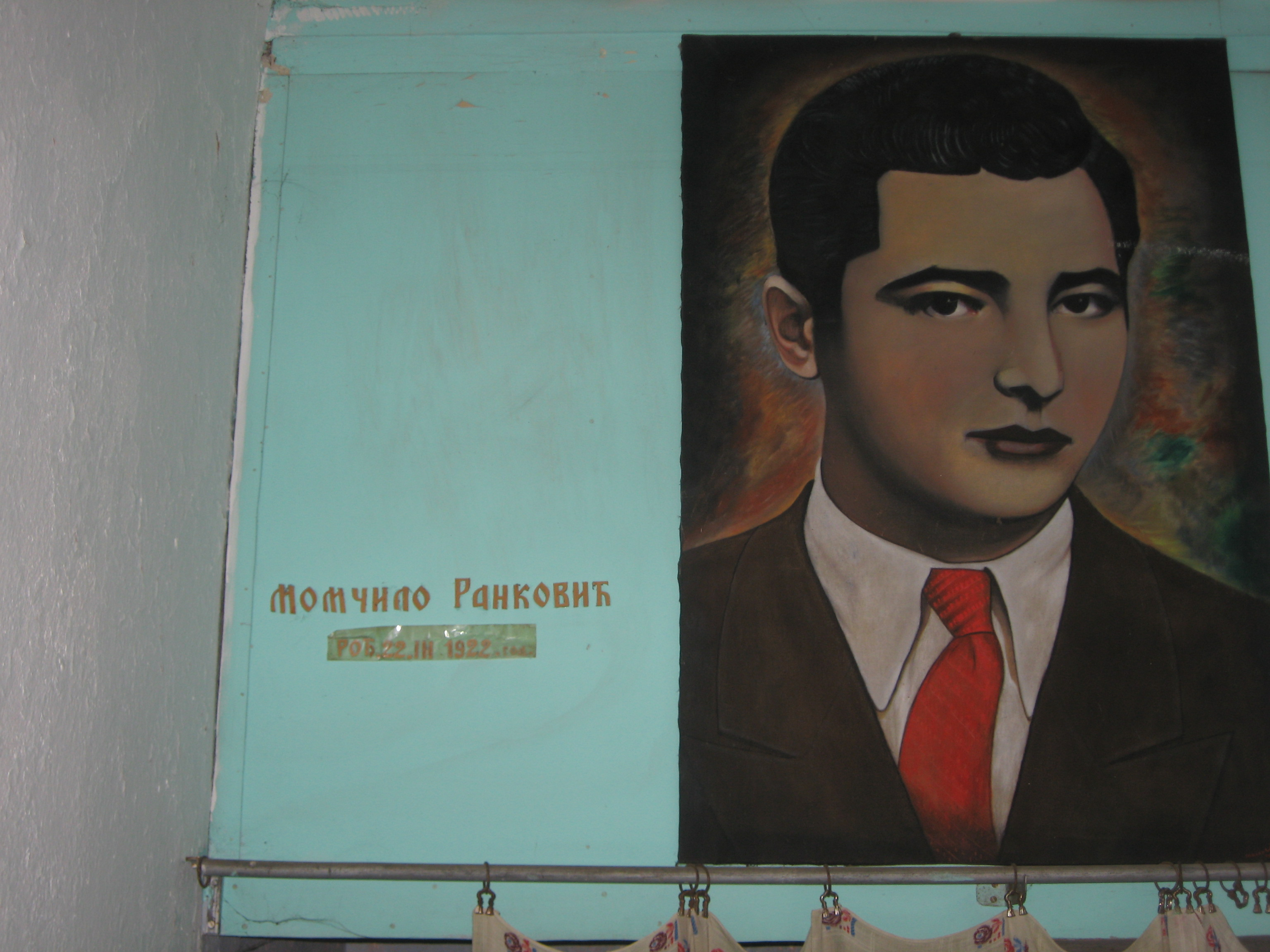 Момчило Ранковић - слика из музеја револуције као успомена на његов лик и дело